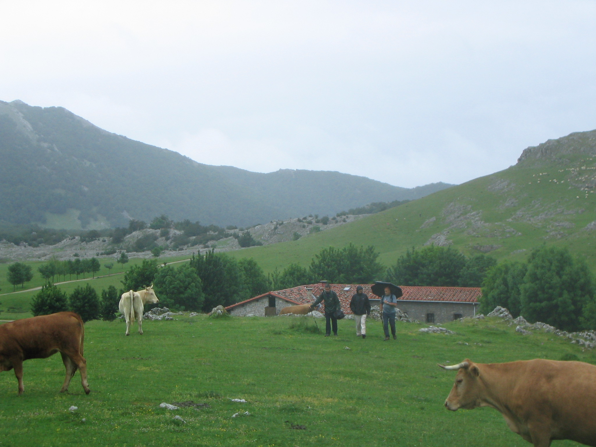 Macizo de Aitzkorri desde Urbia